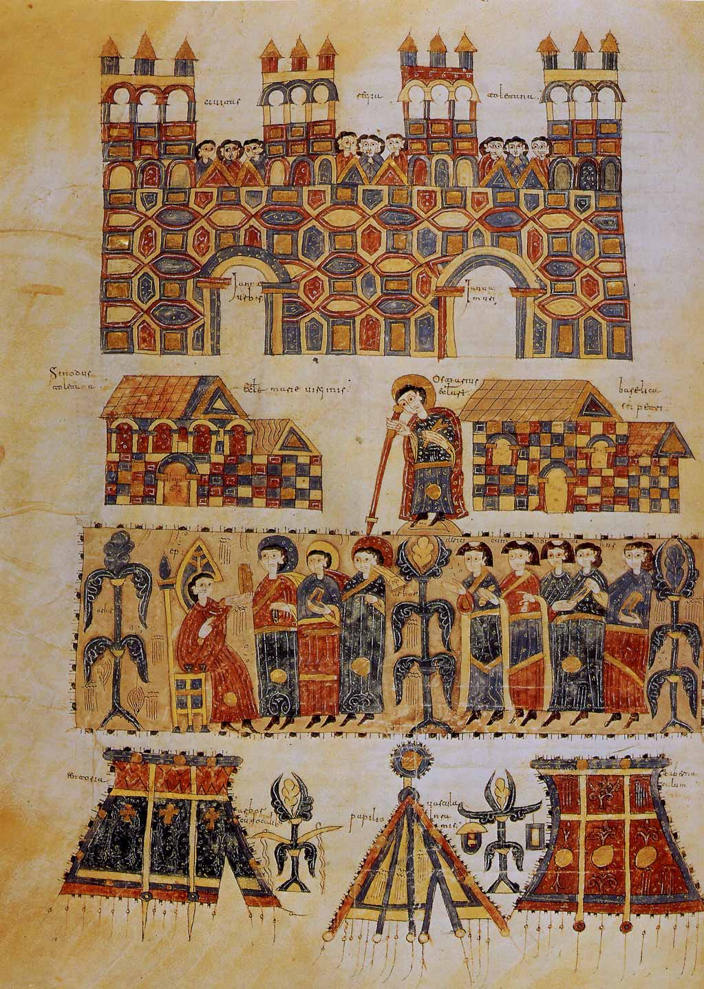 Códice de los Concilios. Folio 129v